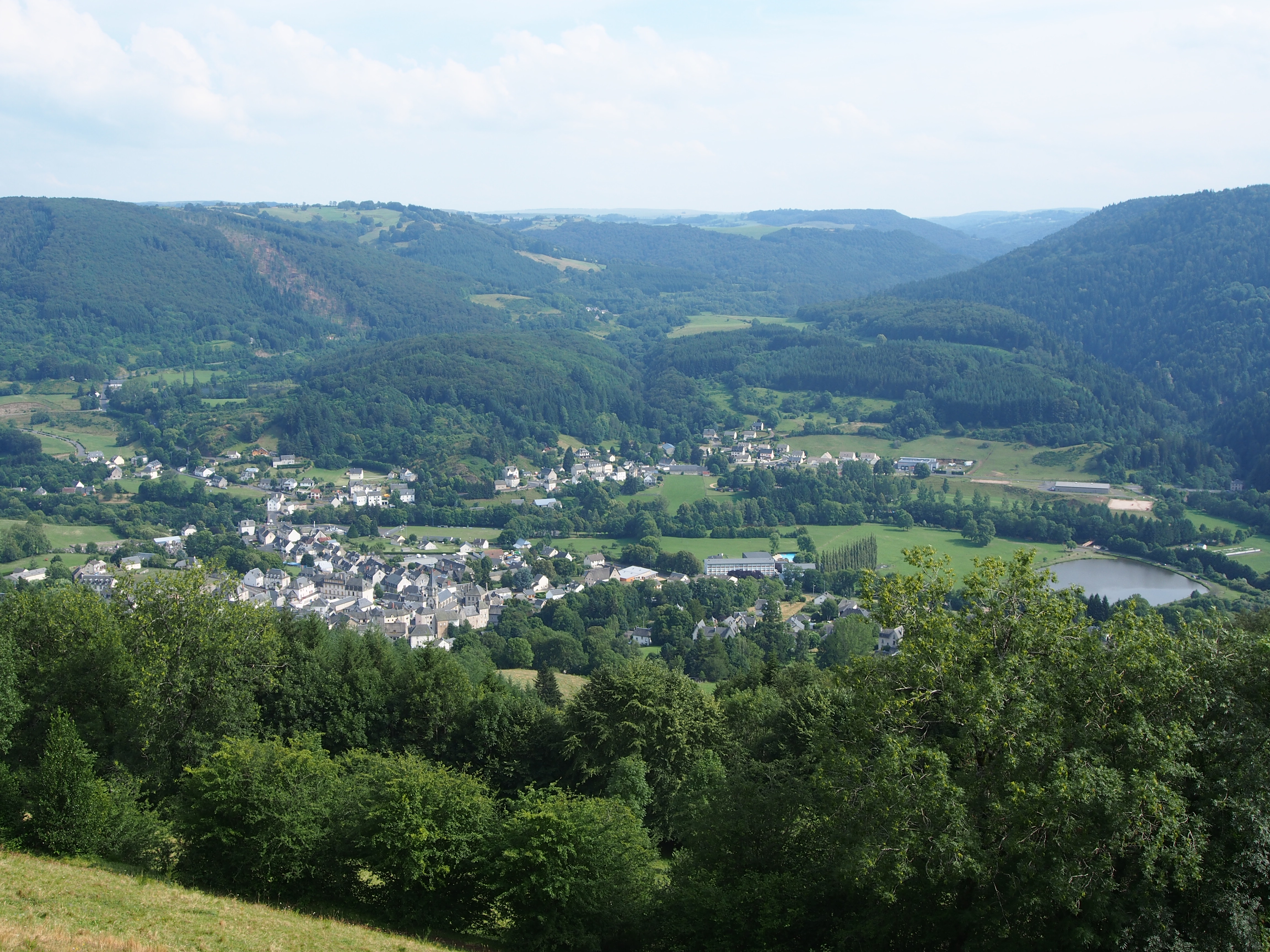 Condat (Cantal 15) vue depuis le belvédère